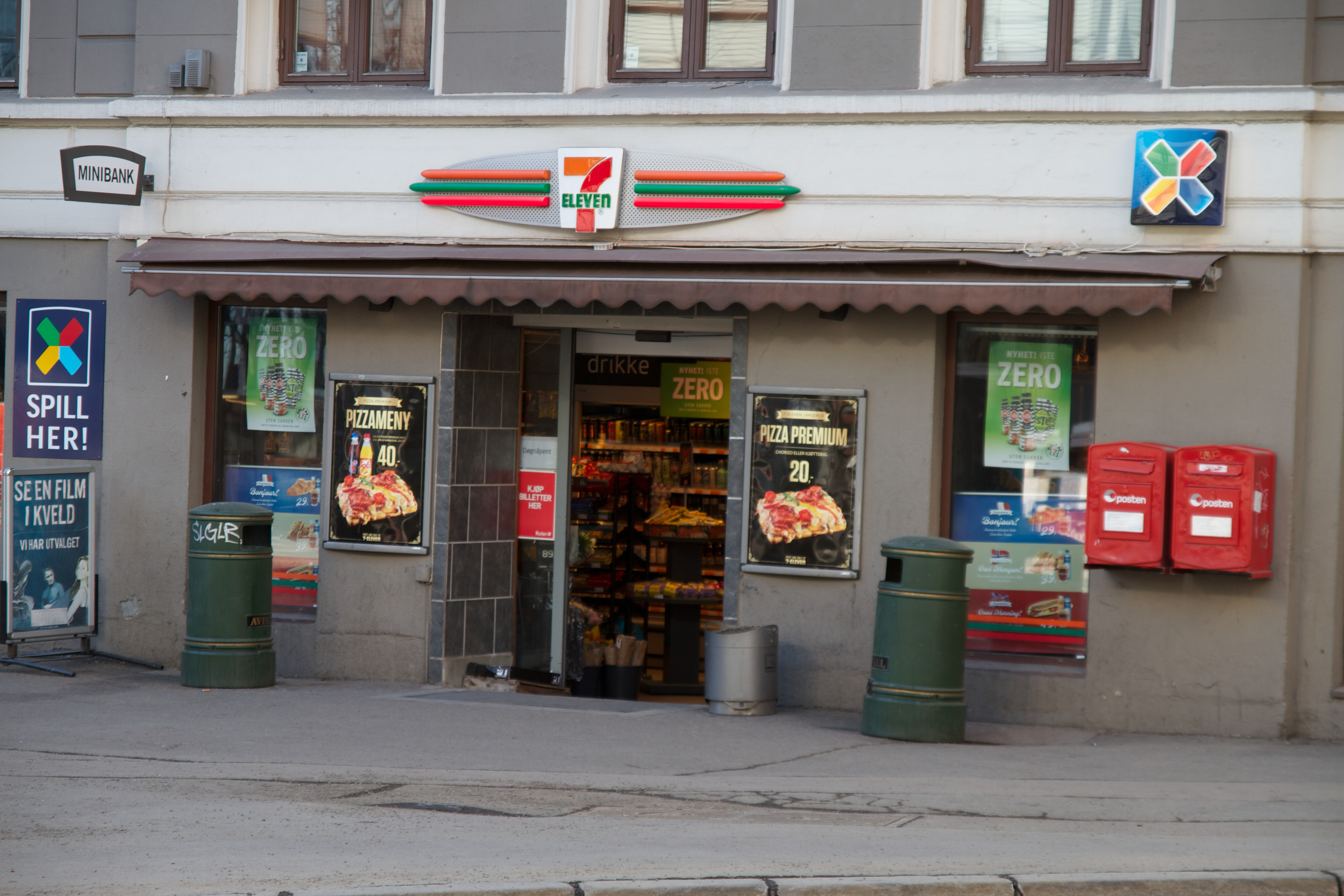 7-Eleven - Holbergs Plass - Oslo